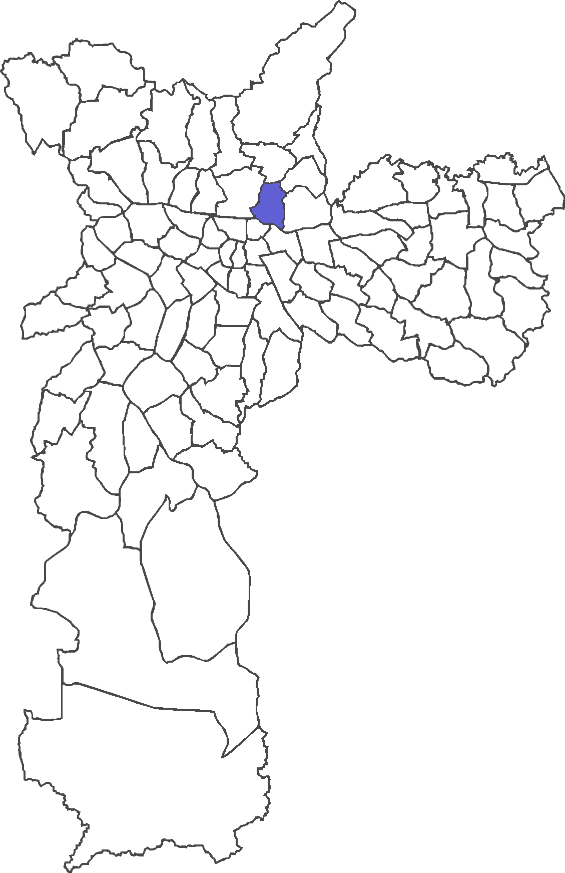 Localização do distrito de Vila Guilherme no município de São Paulo.